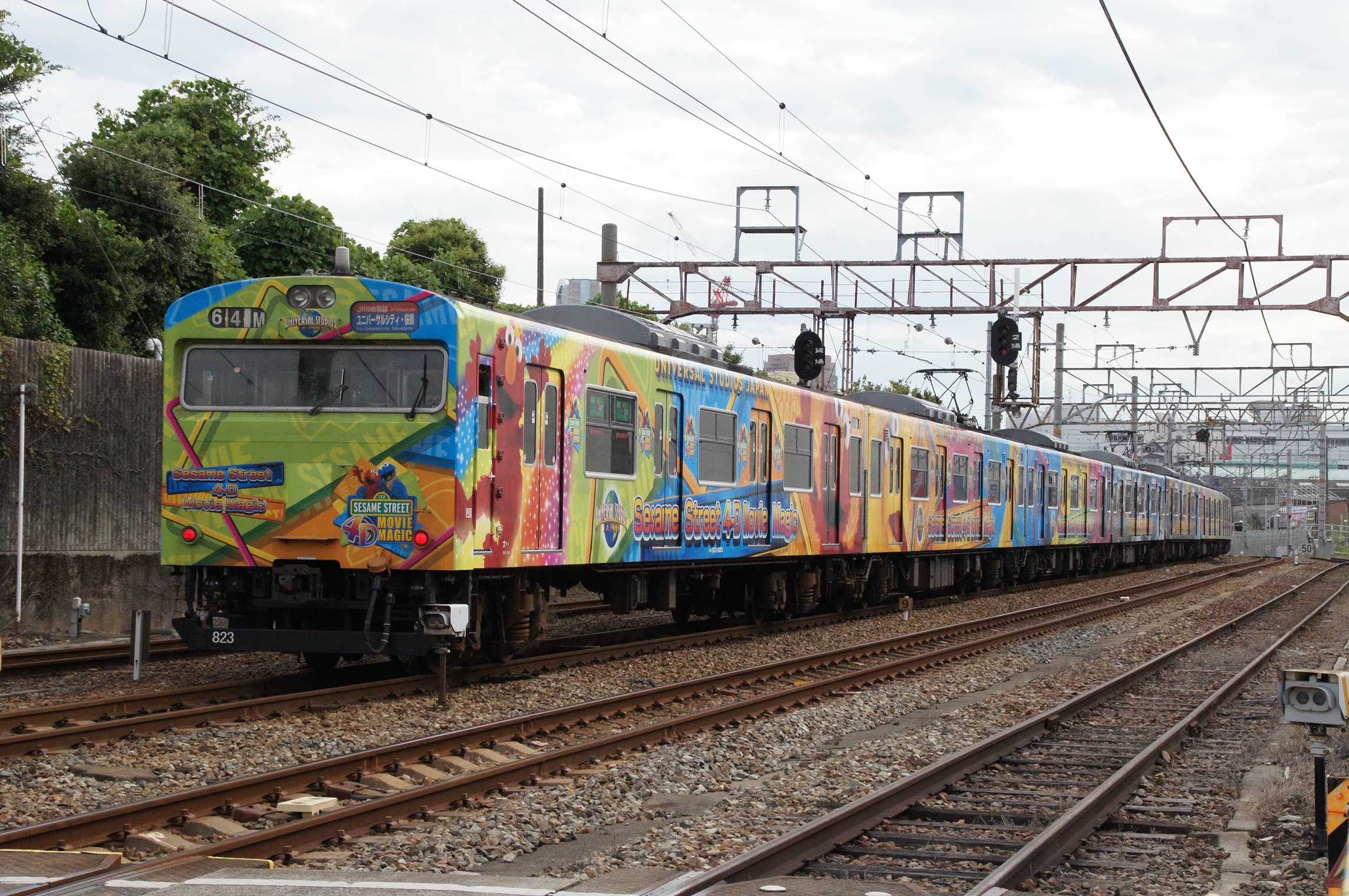 JR西日本 103系（JRゆめ咲線）